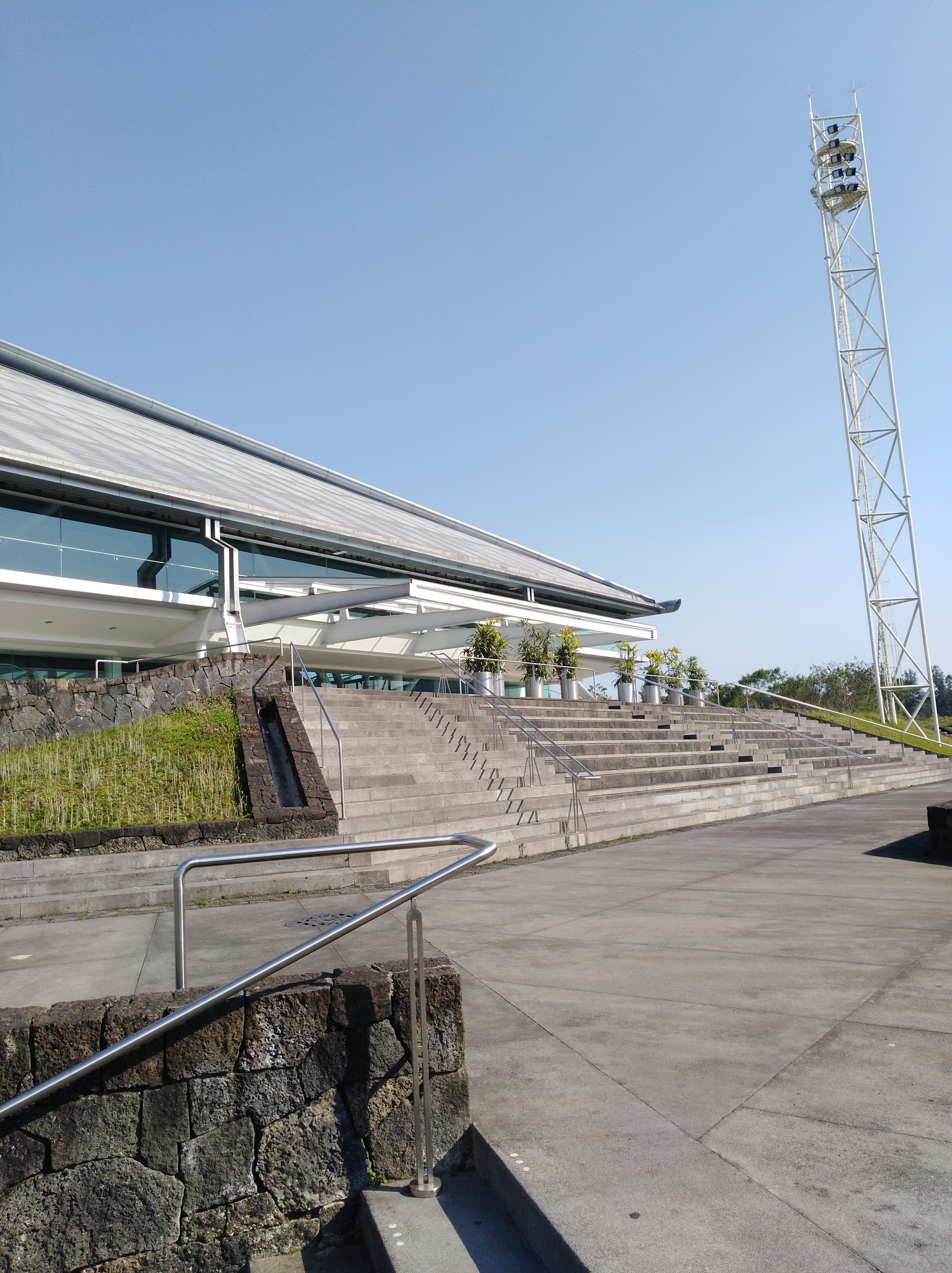 Sala Tlaqná